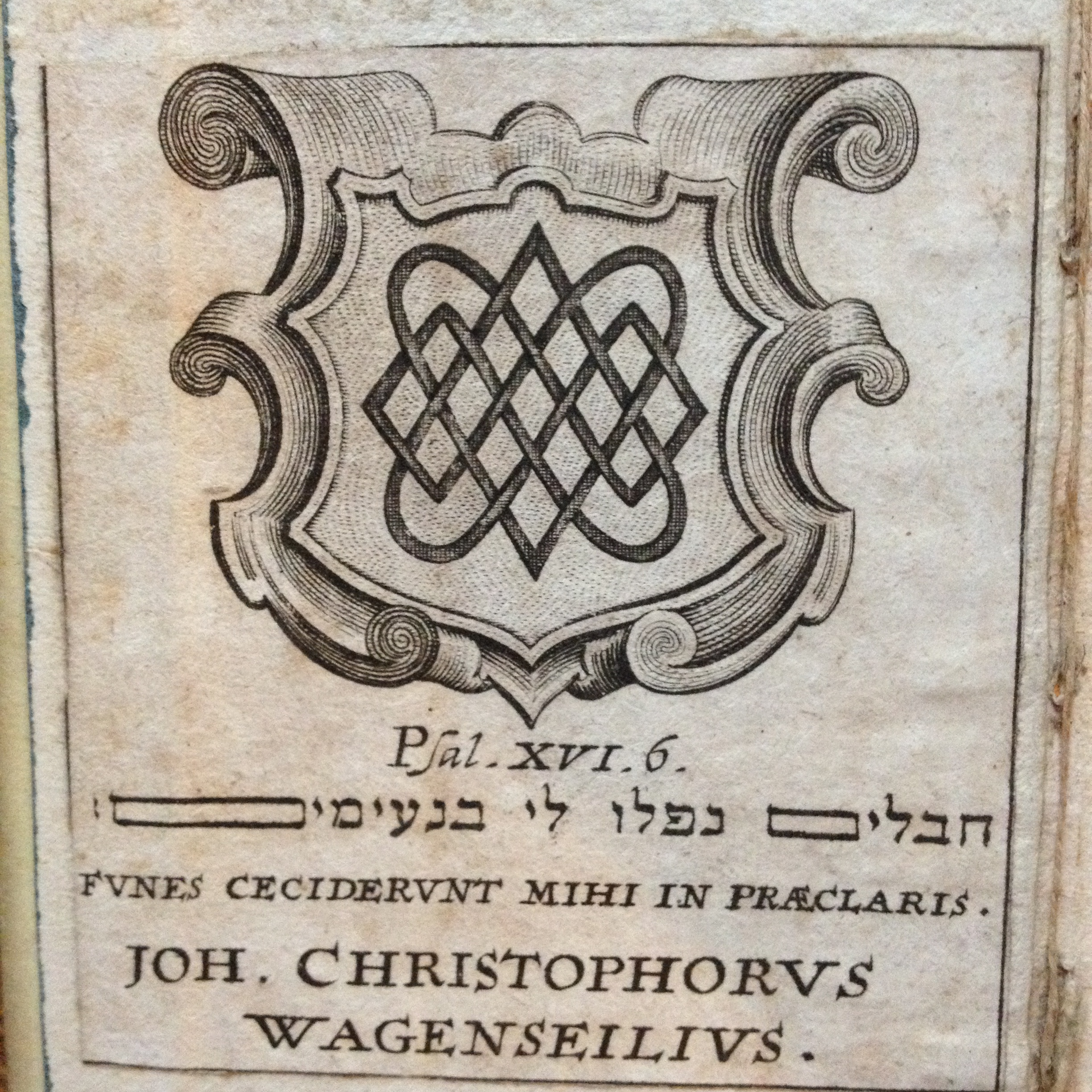 Exlibris Johann Christoph Wagenseil; Originalgröße 70x75 mm in einem Band von 1662.